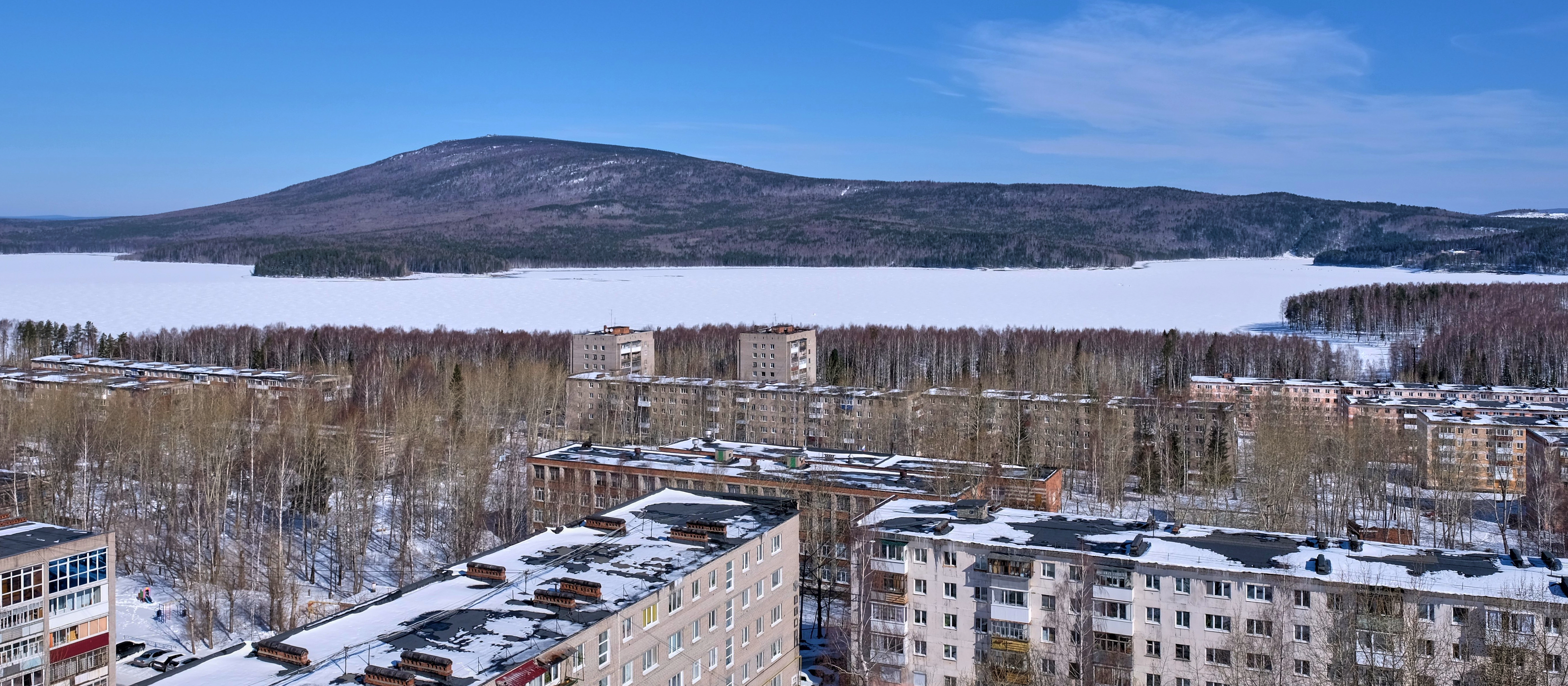 Вид на гору Качканар и Качканарский пруд